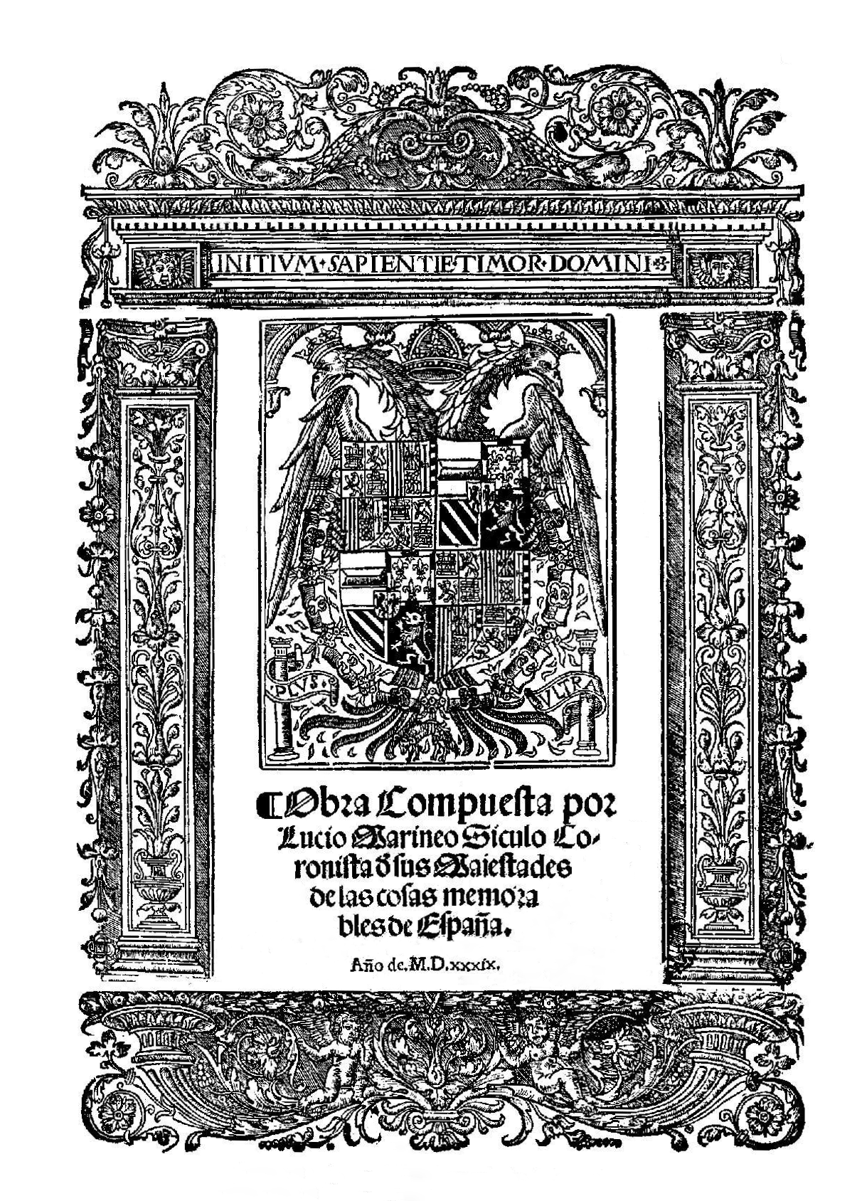 Portada del libro "De las cosas memorables de España" de Lucio Marineo Sículo. Impreso en Alcalá de Henares por Juan de Brocar, en 1539.